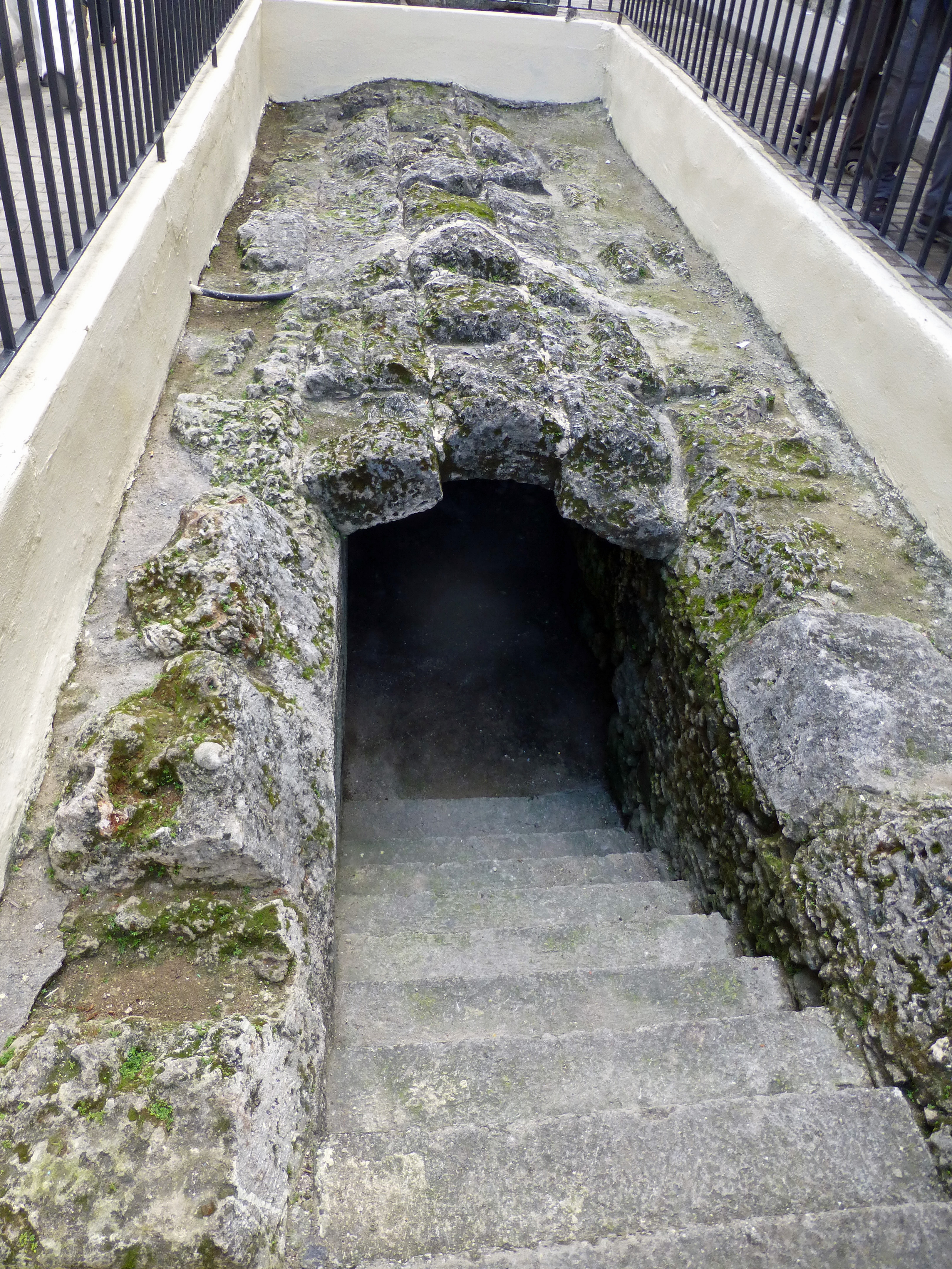 La Havane : accès à la Zanja Real, premier aqueduc construit à Cuba entre 1565 et 1592.